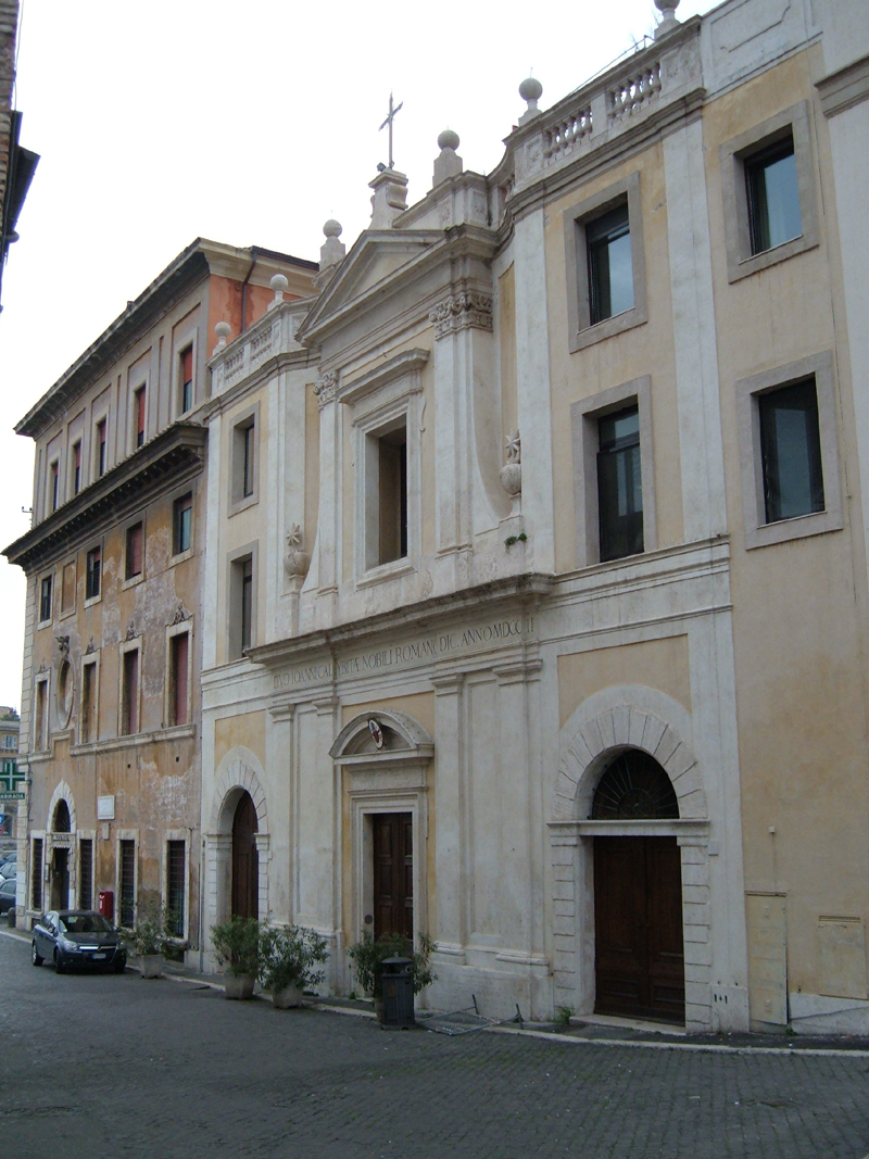 Chiesa di San Giovanni Calibita, a Roma, nel rione Ripa. Foto personale.